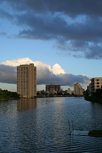 Photo taken from Baridhara Lake, Dhaka.